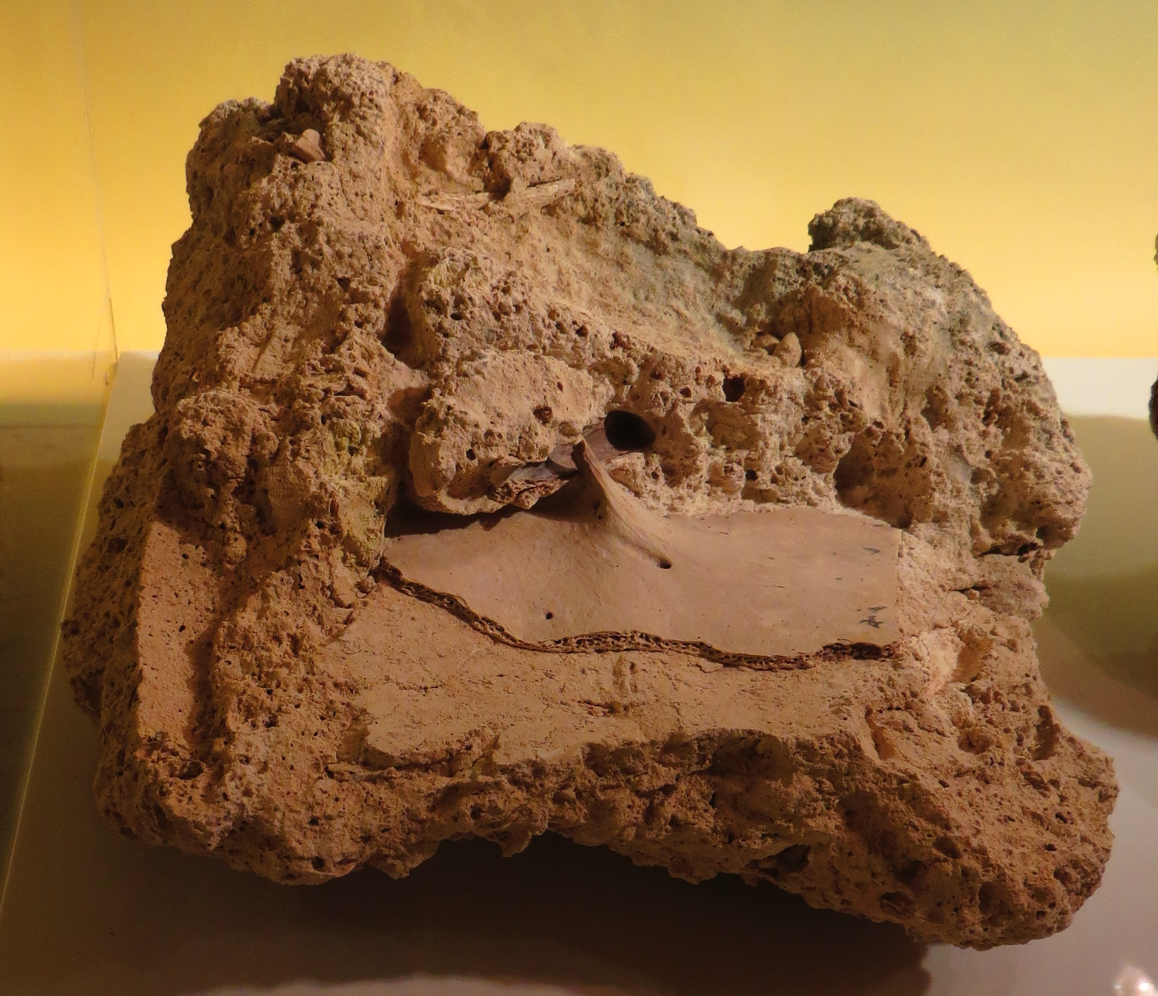 Fossil of Geochelone, an extinct reptile- Took the picture at Museo de la Naturaleza y el Hombre - Tenerife